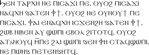 Sample text of Coptic script. Text Ϧⲉⲛ ⲧⲁⲣⲭⲏ ⲛⲉ ⲡⲓⲥⲁϫⲓ ⲡⲉ. ⲟⲩⲟϩ ⲡⲓⲥⲁϫⲓ ⲛⲁϥⲭⲏ ϧⲁⲧⲉⲛ ⲫϯ. ⲟⲩⲟϩ ⲛⲉ ⲟⲩⲛⲟⲩϯ ⲡⲉ ⲡⲓⲥⲁϫⲓ. ⲫⲁⲓ ⲉⲛⲁϥⲭⲏ ⲓⲥϫⲉⲛϩⲏ ϧⲁⲧⲉⲛ ⲫϯ. ϩⲱⲃ ⲛⲓⲃⲉⲛ ⲁⲩ ϣⲱⲡⲓ ⲉⲃⲟⲗ ϩⲓⲧⲟⲧϥ. ⲟⲩⲟϩ ⲁⲧϭⲛⲟⲩϥ ⲙ̅ⲡⲉ ϩⲗⲓ ϣⲱⲡⲓ ϧⲉⲛ ⲫⲏ ⲥⲧⲁϥϣⲱⲡⲓ. ⲛⲉ ⲡⲱⲛϧ ⲡⲉⲧⲉⲛϧⲏⲧϥ. Font New Athena Unicode ver. 3[1], regular.